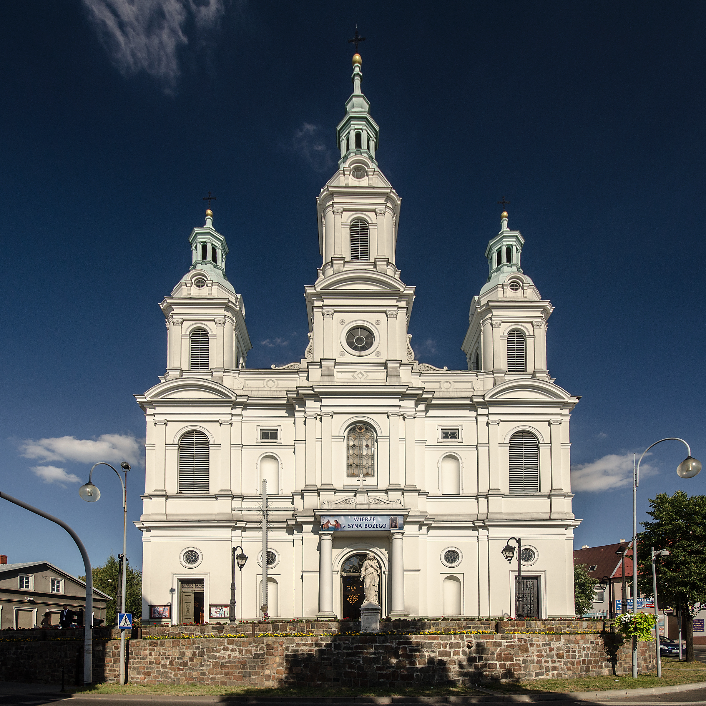 Radomsko, kościół par. p.w. św. Lamberta, 1869-1875